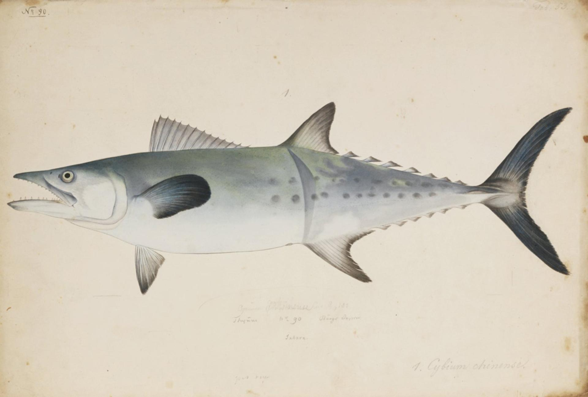 Scomberomorus sinensis (Lacépède)